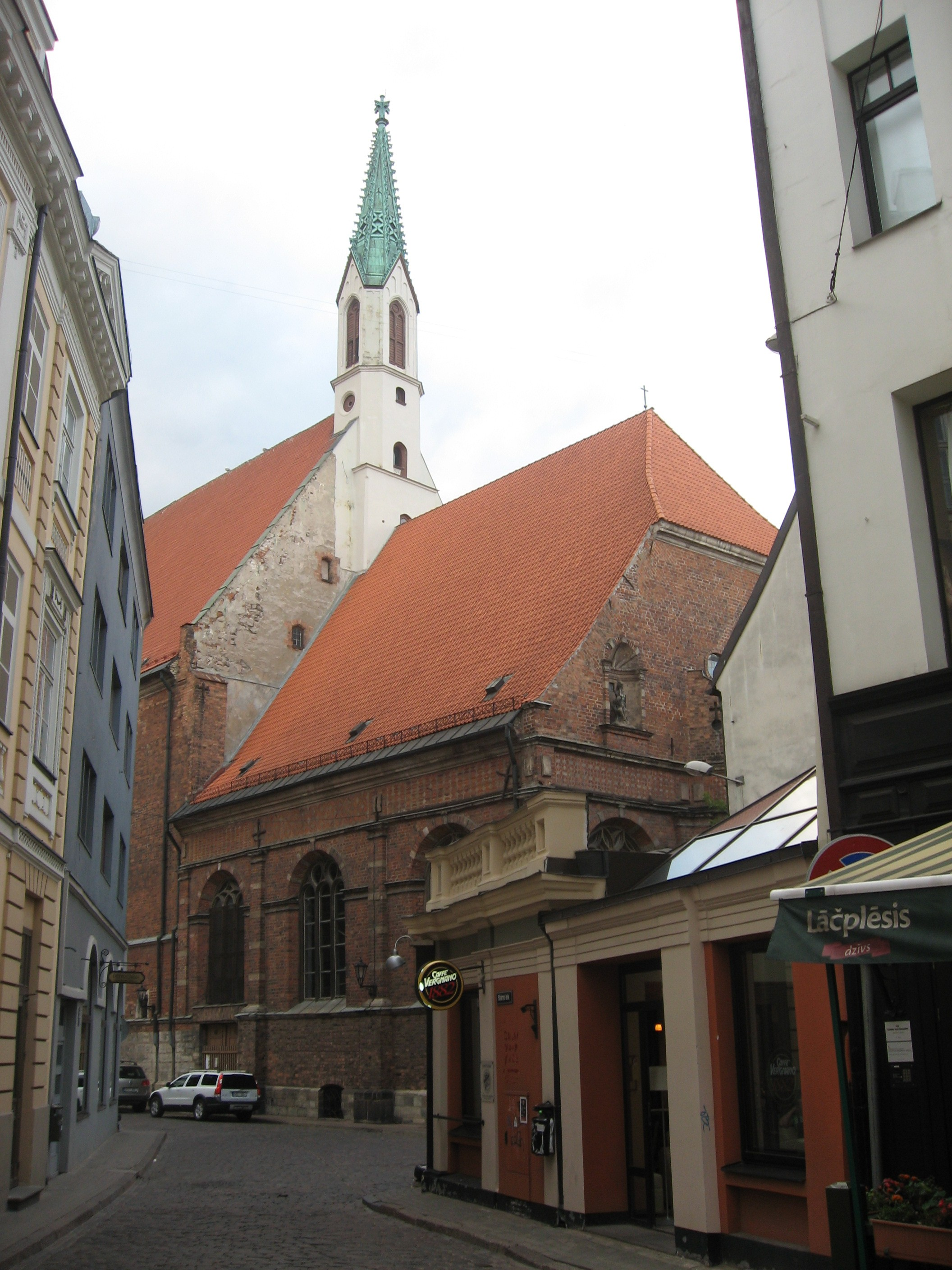 Evaņģēliski Luteriskās Rīgas Svētā Jāņa baznīcas komplekss